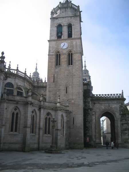 Catedral de Lugo, Galicia